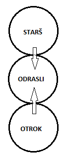 Ego stanja v transakcijski analizi